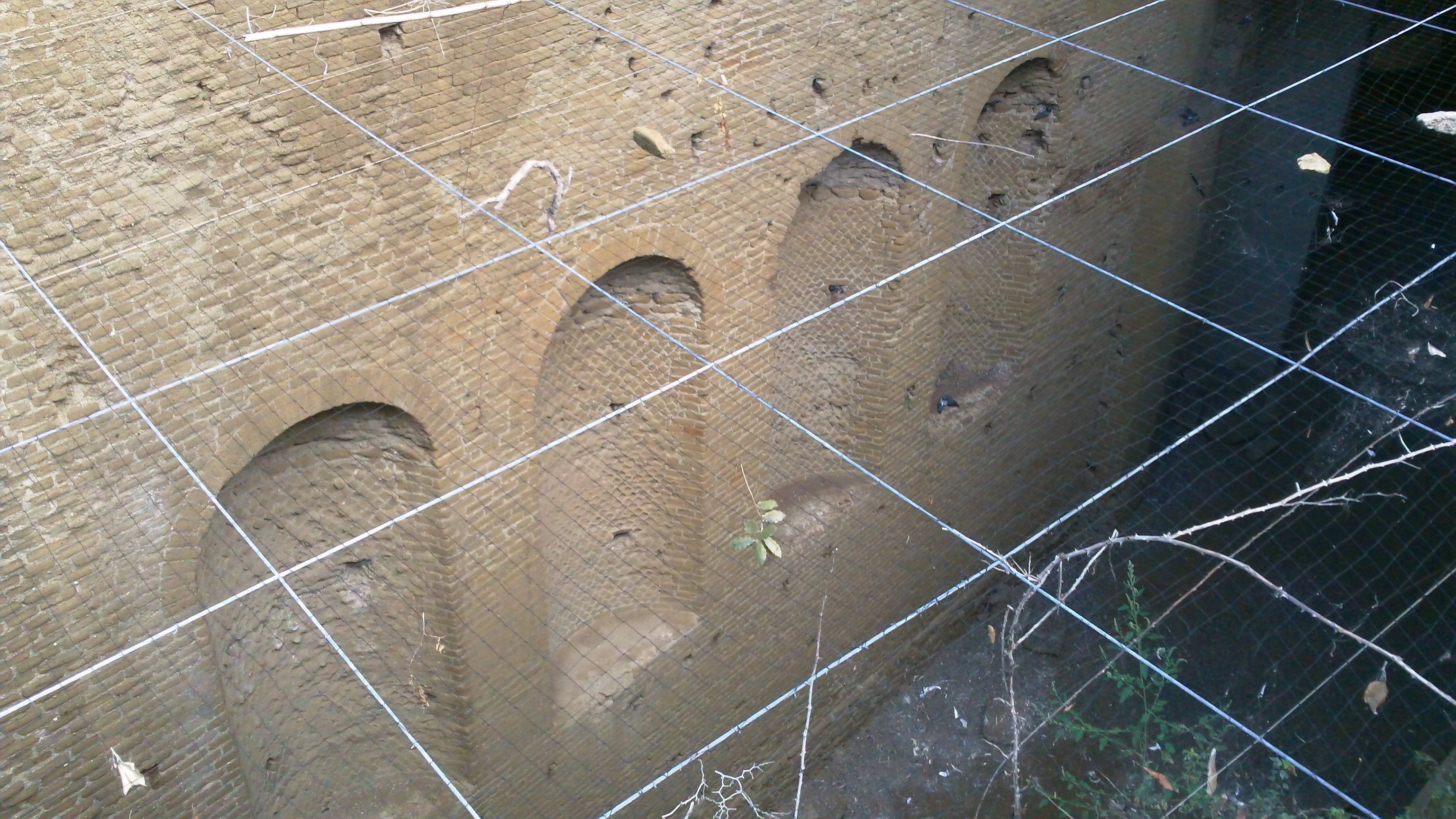 La Crypta Romana est un tunnel sous-terrain liant Cumes et le Lac Averne. Projet entrepris par Octave Auguste de faire du Lac Averne un port militaire et abandonné un peu plus tard.